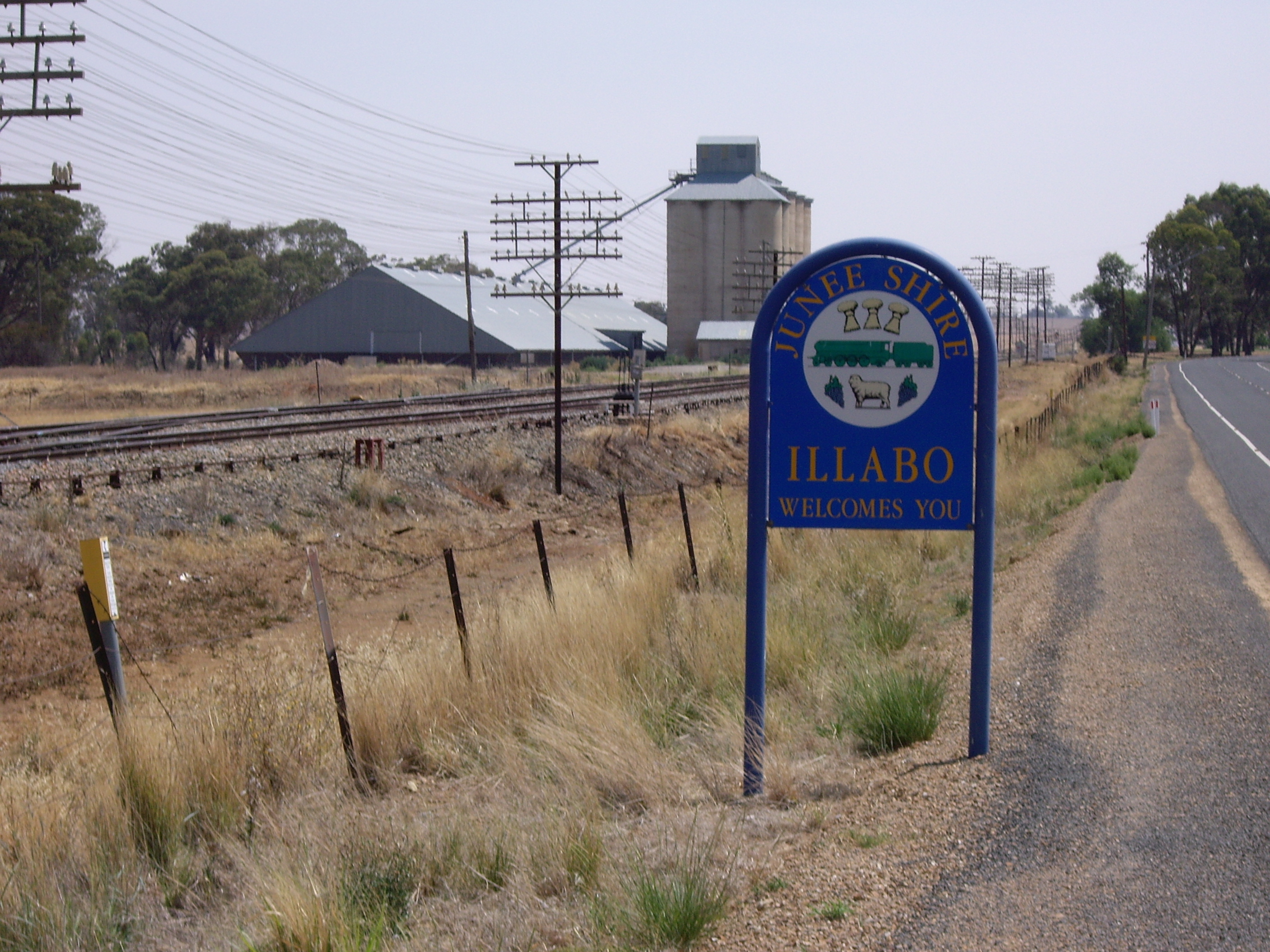 Entering Illabo